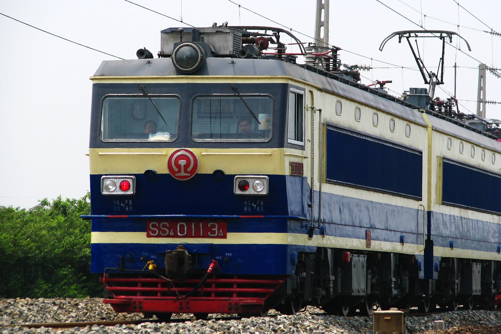 中国铁路韶山4型电力机车